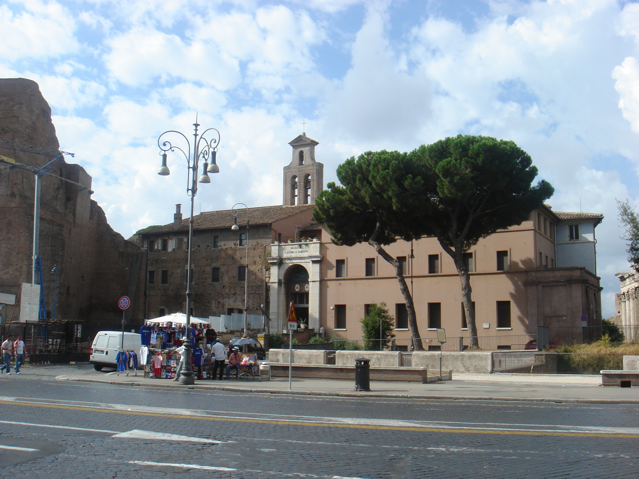 Roma, santi Cosma e Damiano